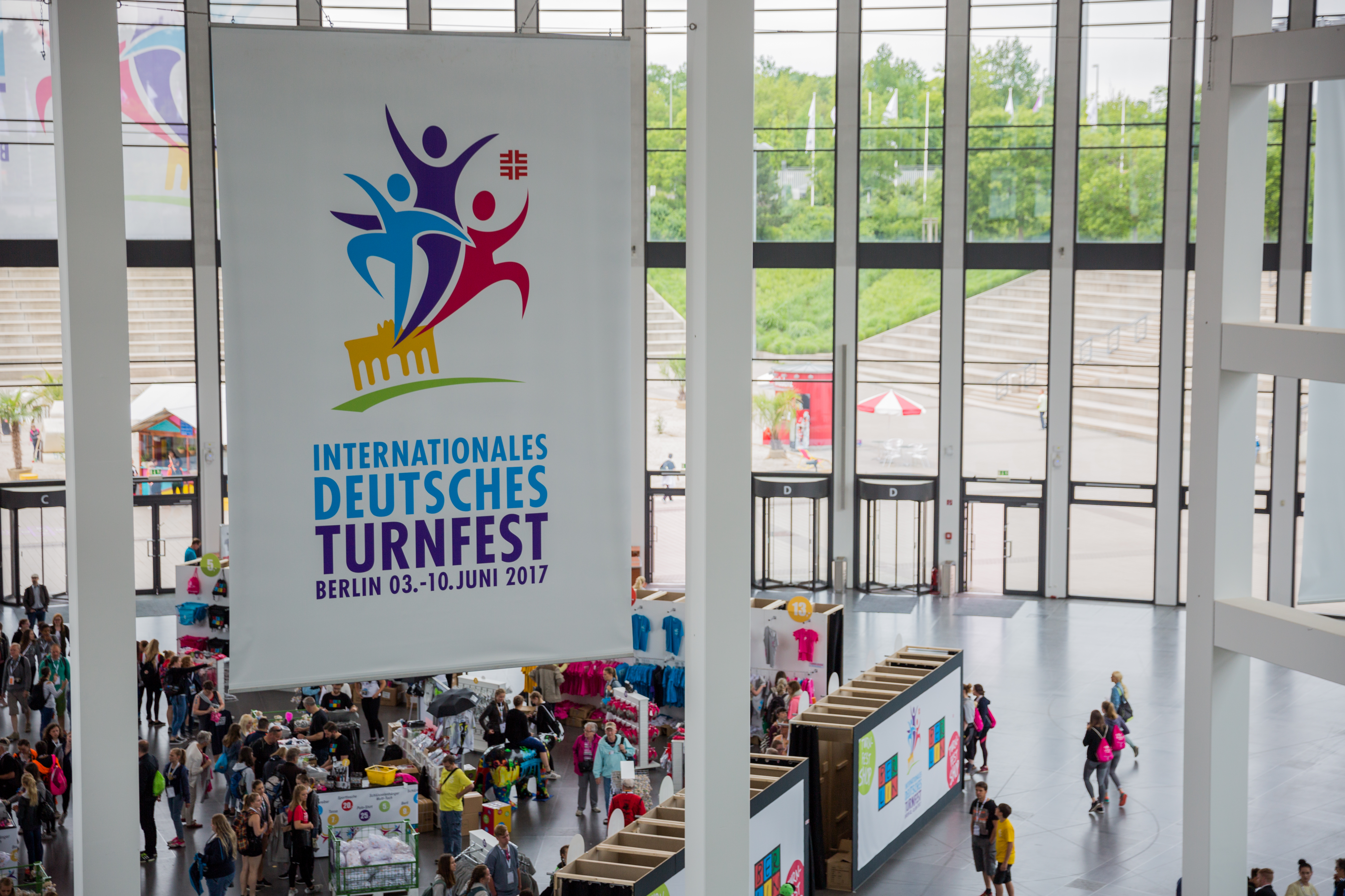 Der Eingang Messe Süd auf dem Internationalen Deutschen Turnfest 2017 in Berlin am 08. Juni